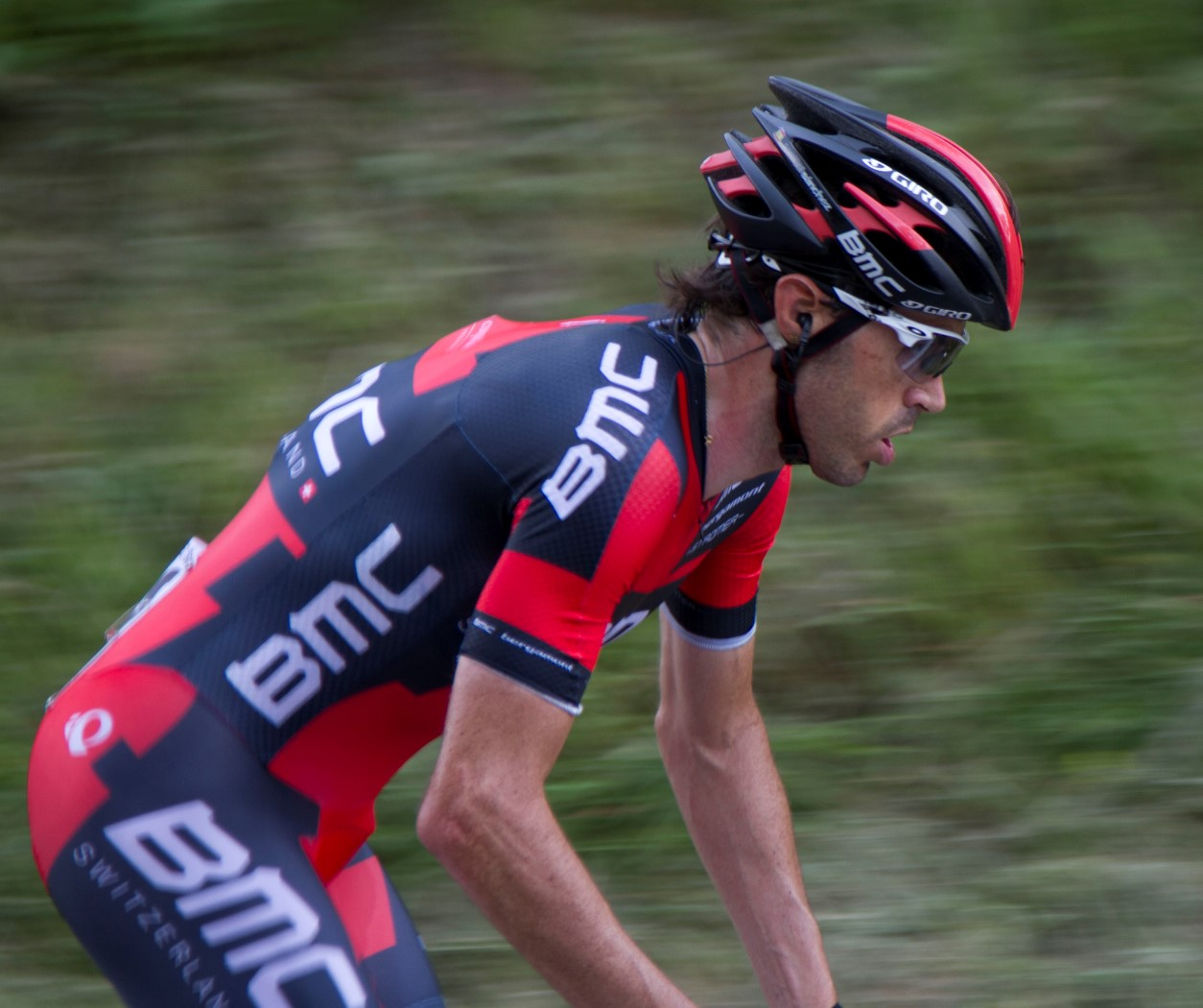 322 samuel sanchez